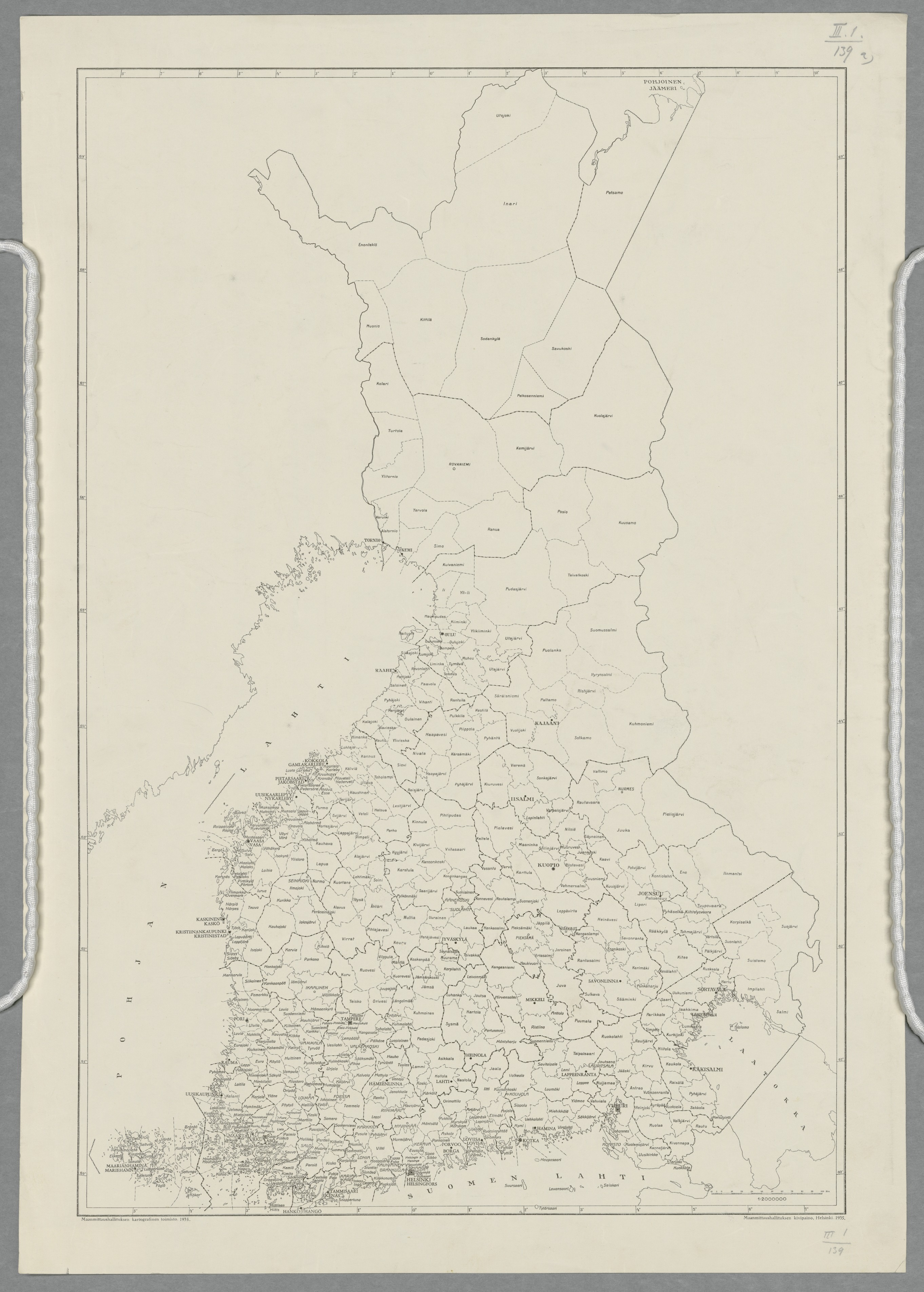 Suomi, tilastokartta 1935: Kuntajaot